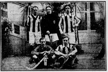 Equipe de France de rink hockey en 1920 pour son premier match. Joué contre la Belgique le 20 mars. Composition: Descamp (HCF), Richardson (HCF), Dobigies (HCF), Steinfickel (PHC) et Peters (goal, PHC).